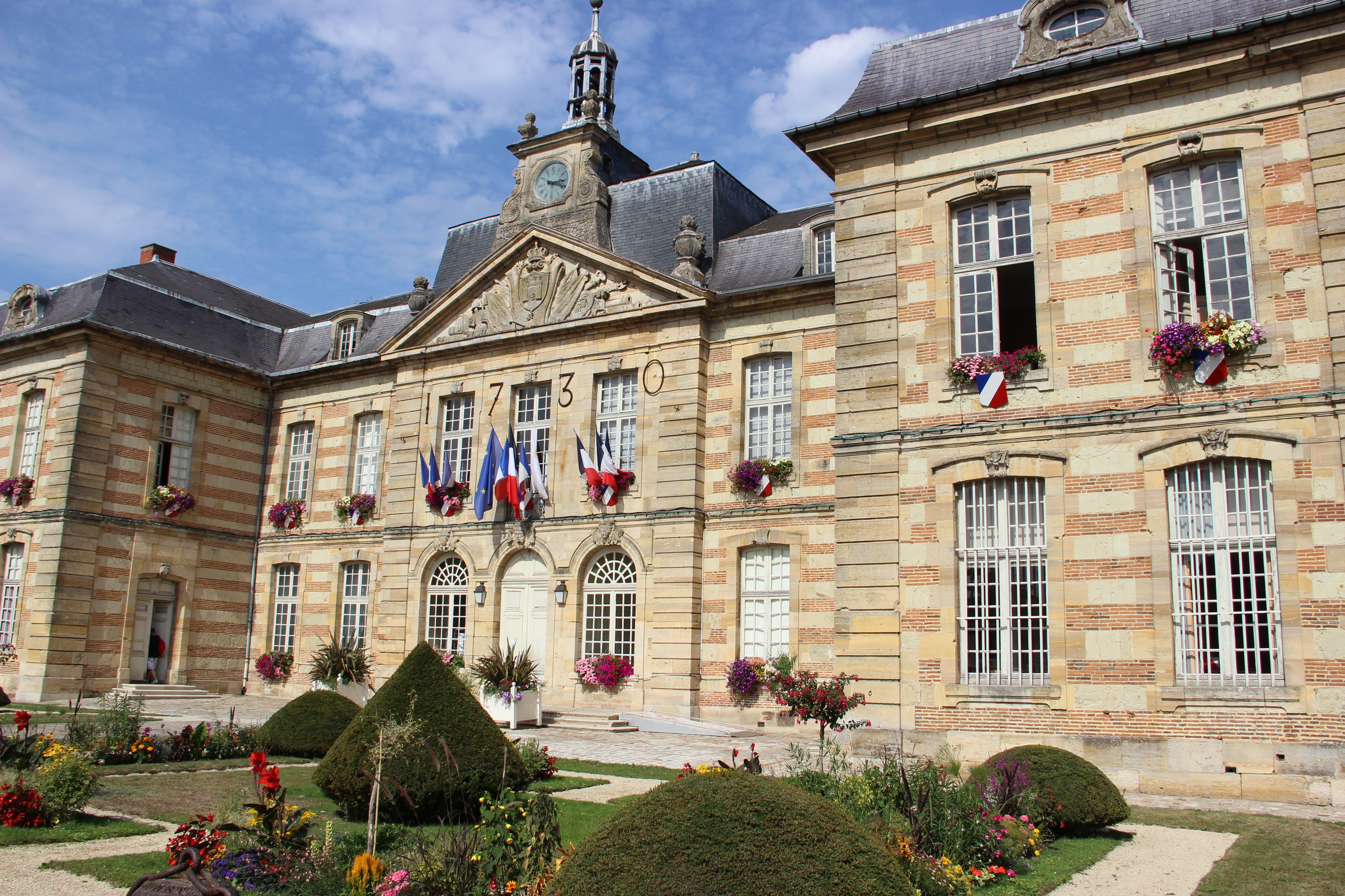 La mairie